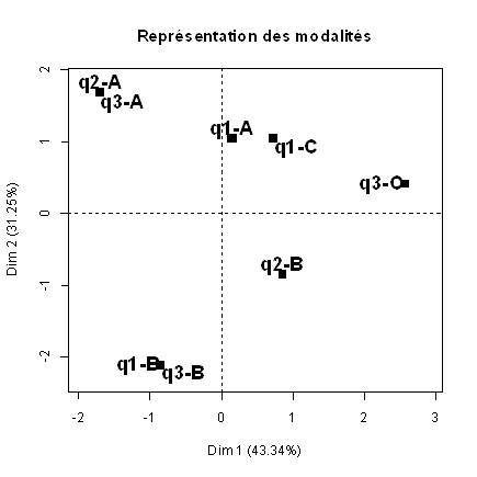 Figure4. AFDM